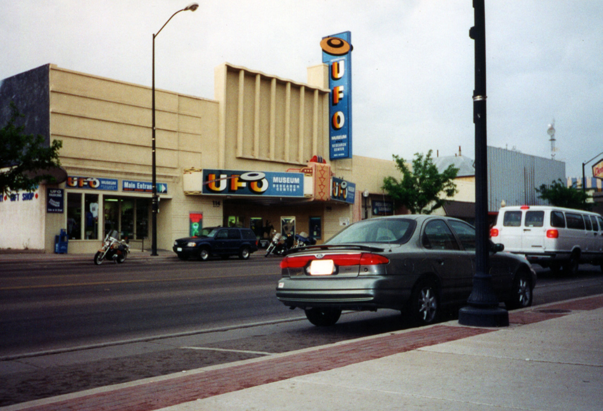 Roswell UFO Museum